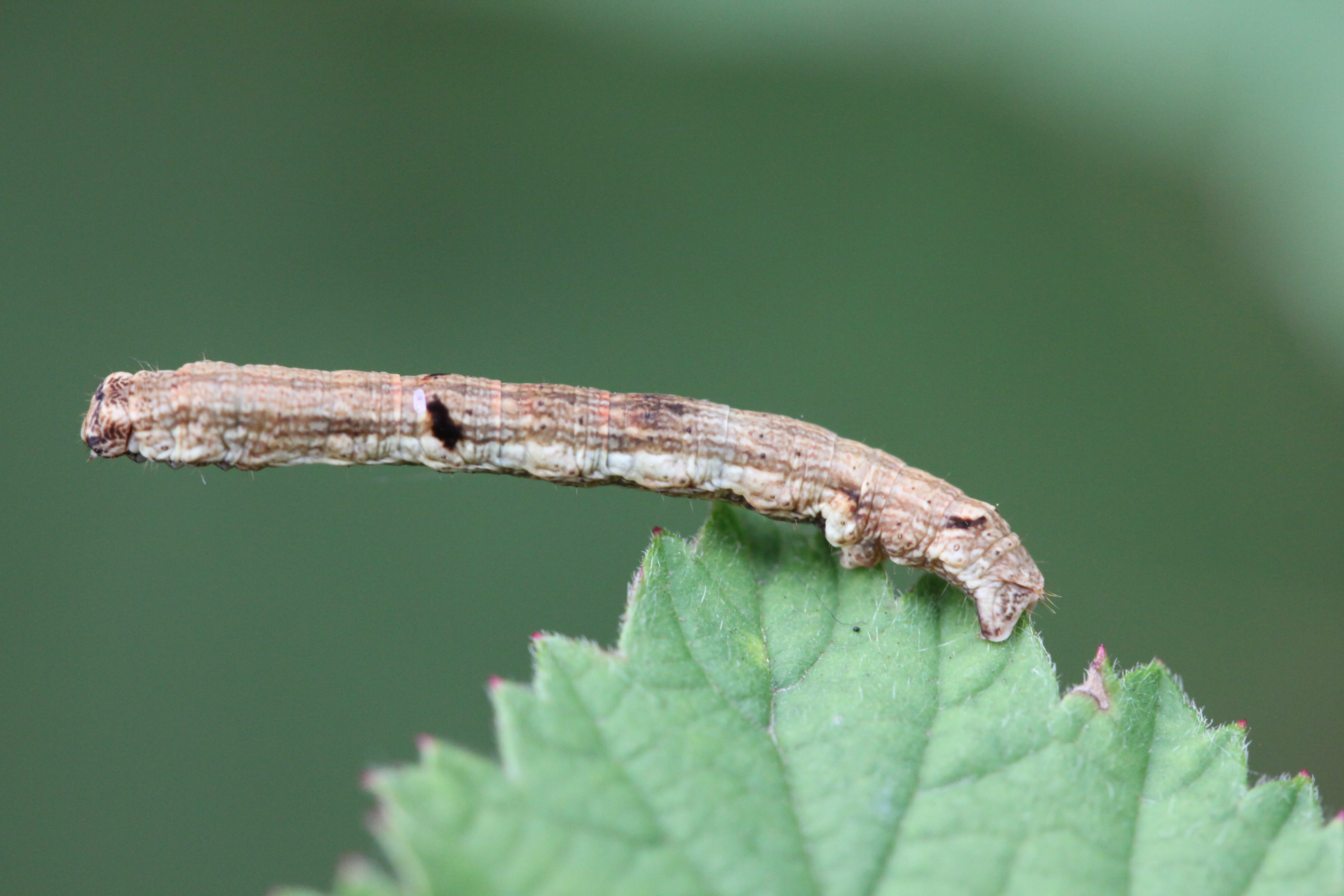 Junge Raupe des Zackenbindigen Rindenspanners (Ectropis crepuscularia) in der Schwetzinger Hardt